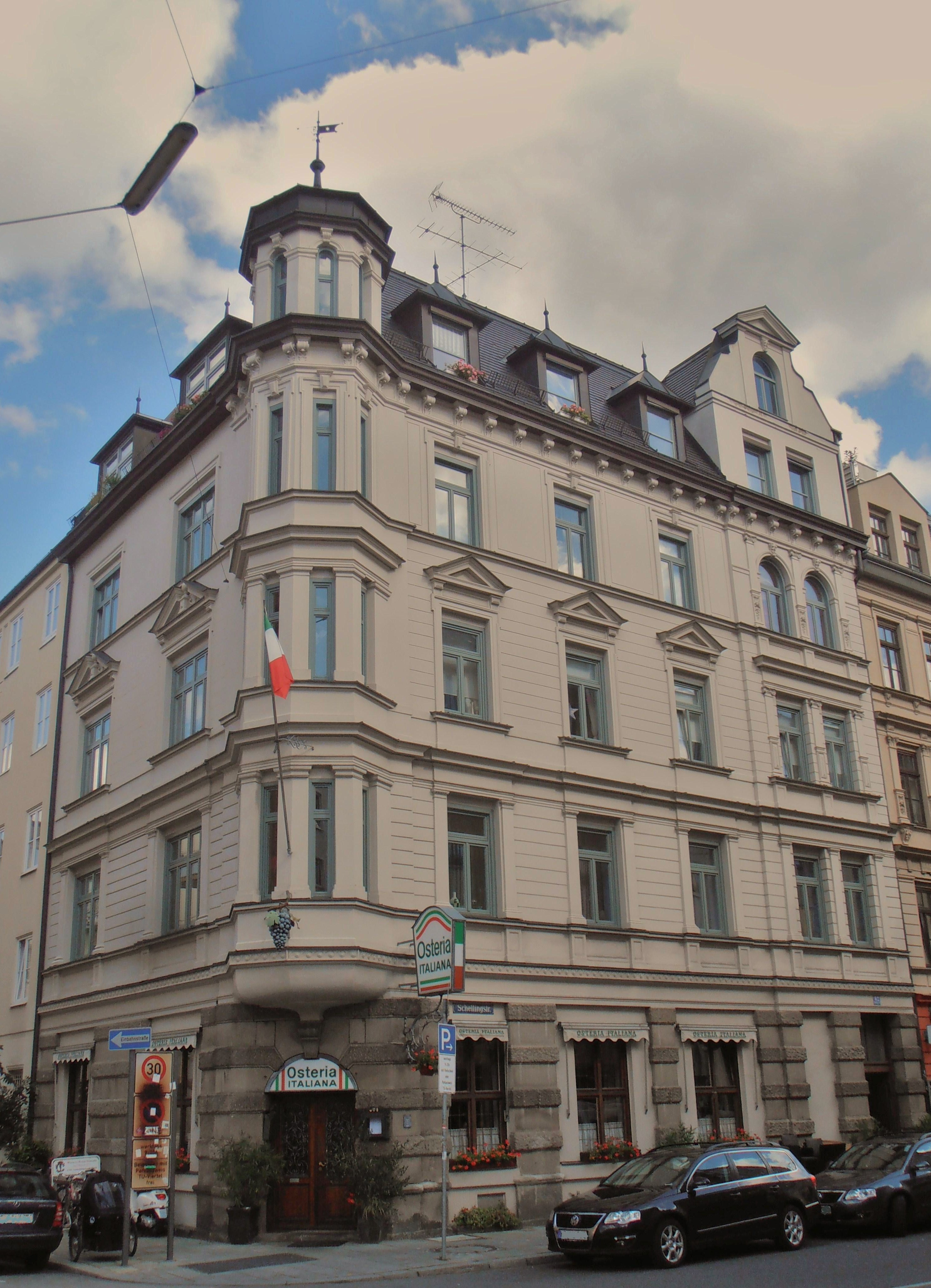 Denkmalgeschütztes Haus in der Schellingstraße 62 mit italienischem Lokal "Osteria Italiana" in der Maxvorstadt in München